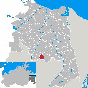 Züsedom in Mecklenburg-Vorpommern, Landkreis Uecker-Randow